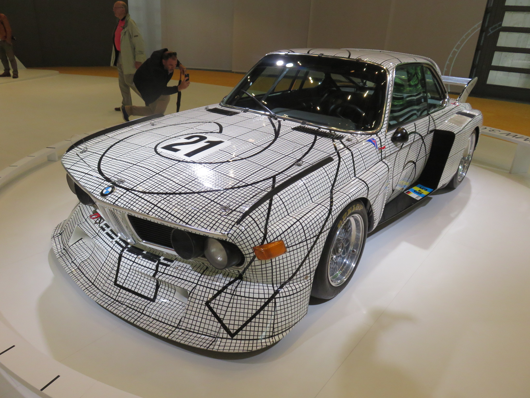 Concorso d'eleganza Villa d'Este 2015, BMW 3.0 CSL Art Car by Frank Stella